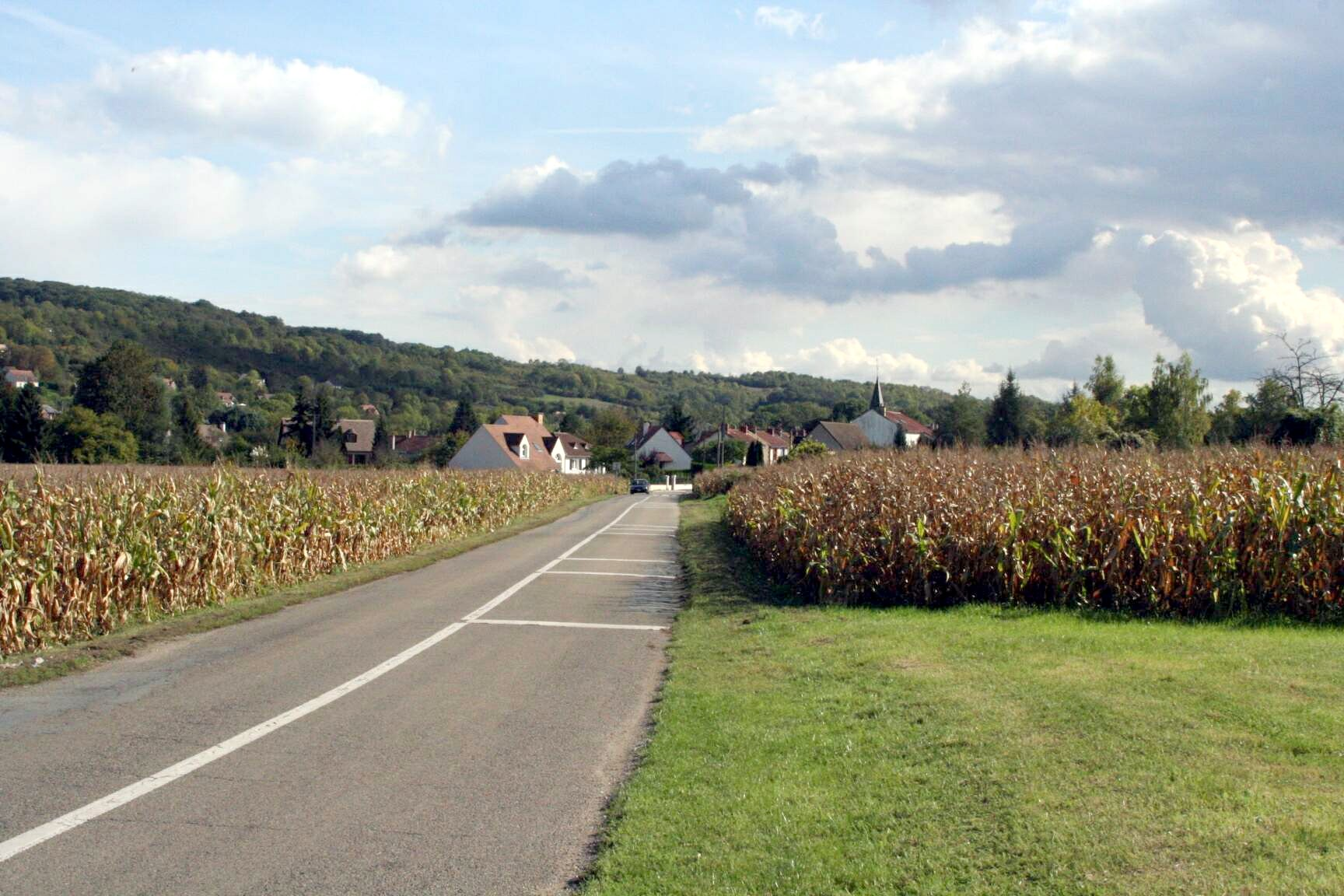 Vue générale d'Aulnay-sur-Mauldre - Yvelines (France), route de la Falaise